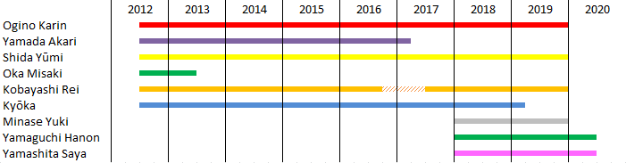 Évolution de l'effectif du groupe Yumemiru Adolescence